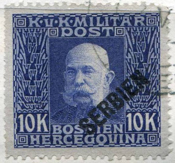 Почтовая марка Сербии (надпечатка на марке Боснии и Герцеговины)